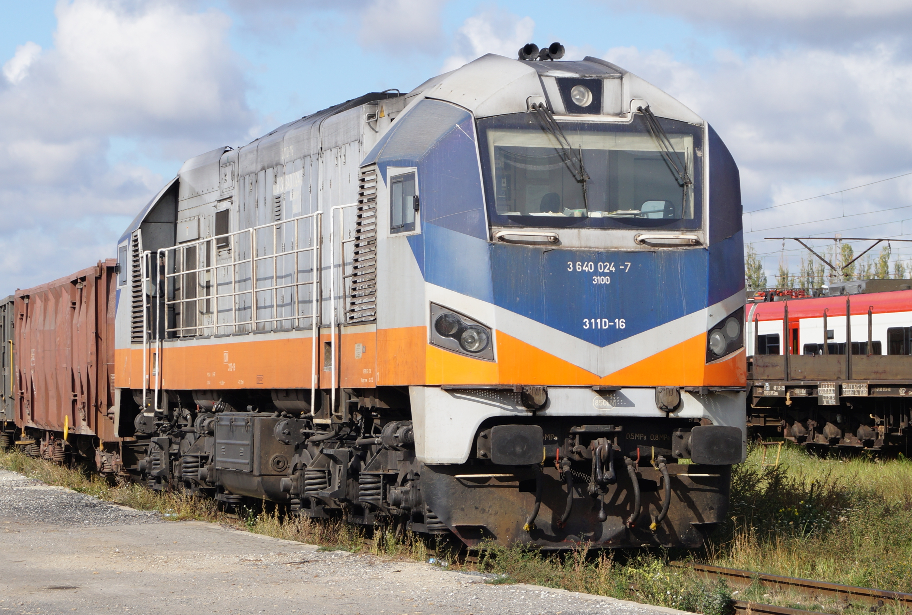 The making of this document was supported by Wikimedia Polska Association, within Wikigrant no. WG 2015-34. Lokomotywa spalinowa typu 311D w barwach DB Shenker Rail Polska na bocznicy w Koninie